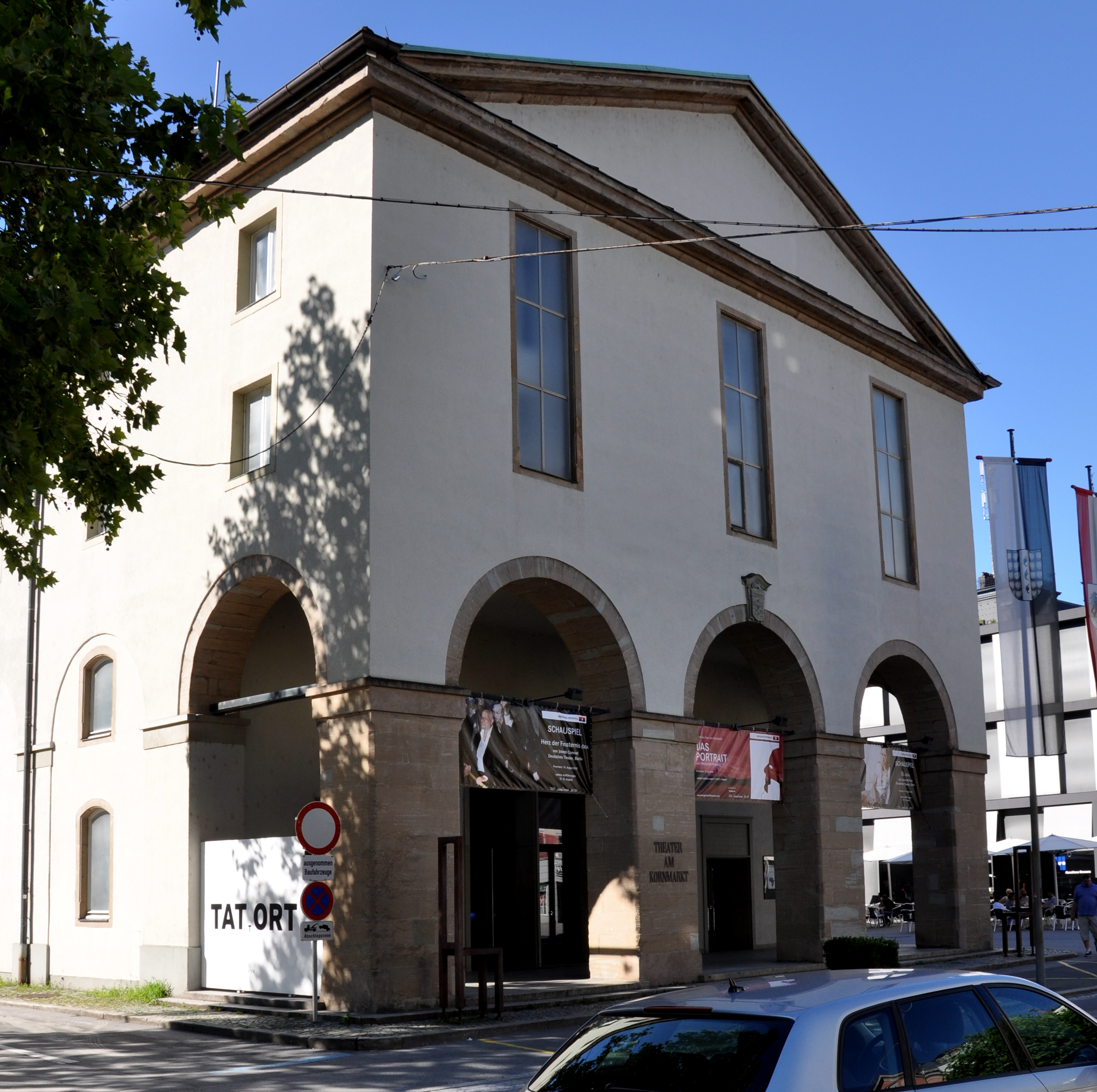 Bregenz, Theater am Kornmarkt (Vorarlberger Landestheater)